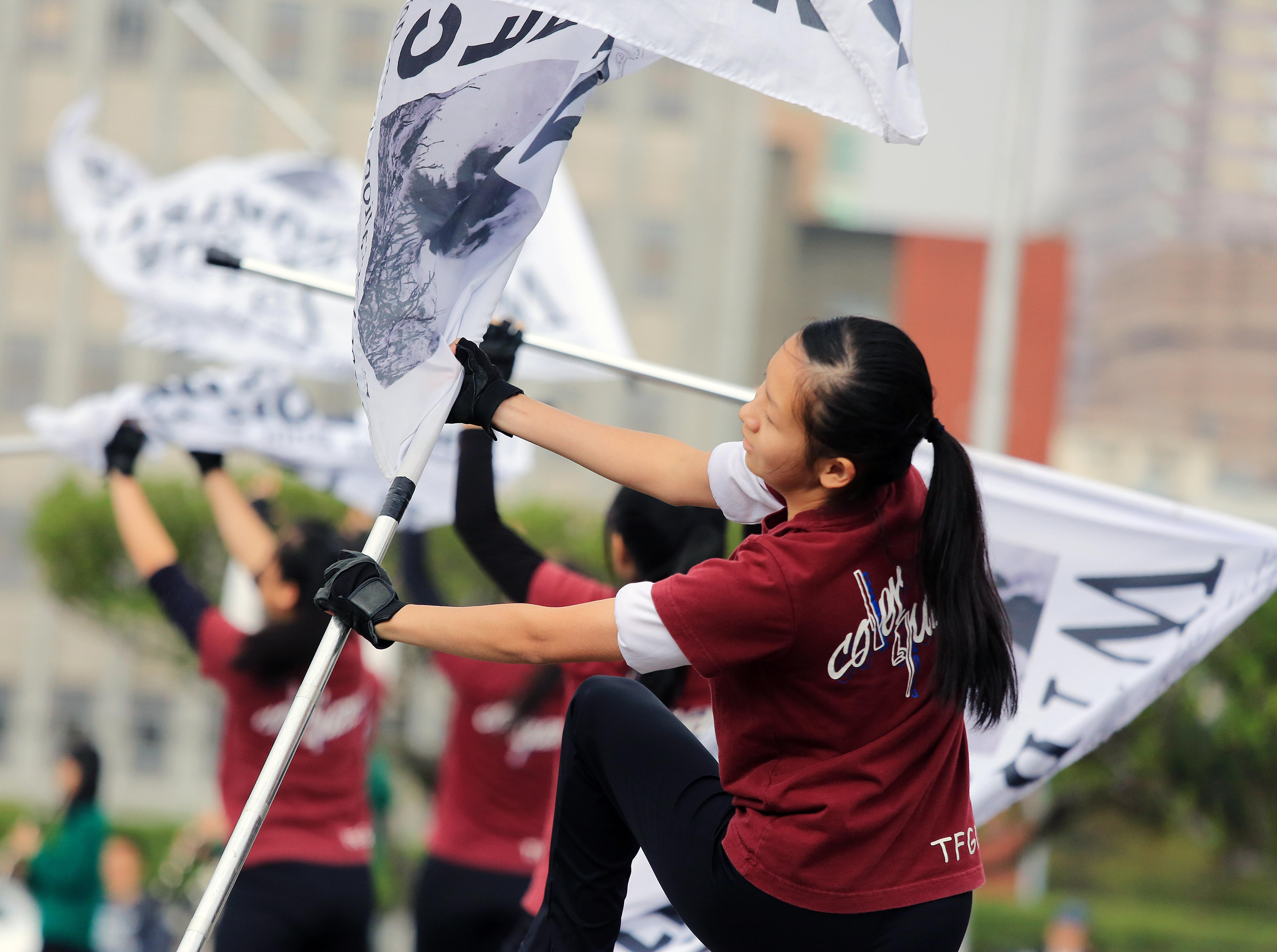 12.30 總統府升旗音樂會預演,由北一女旗隊演出